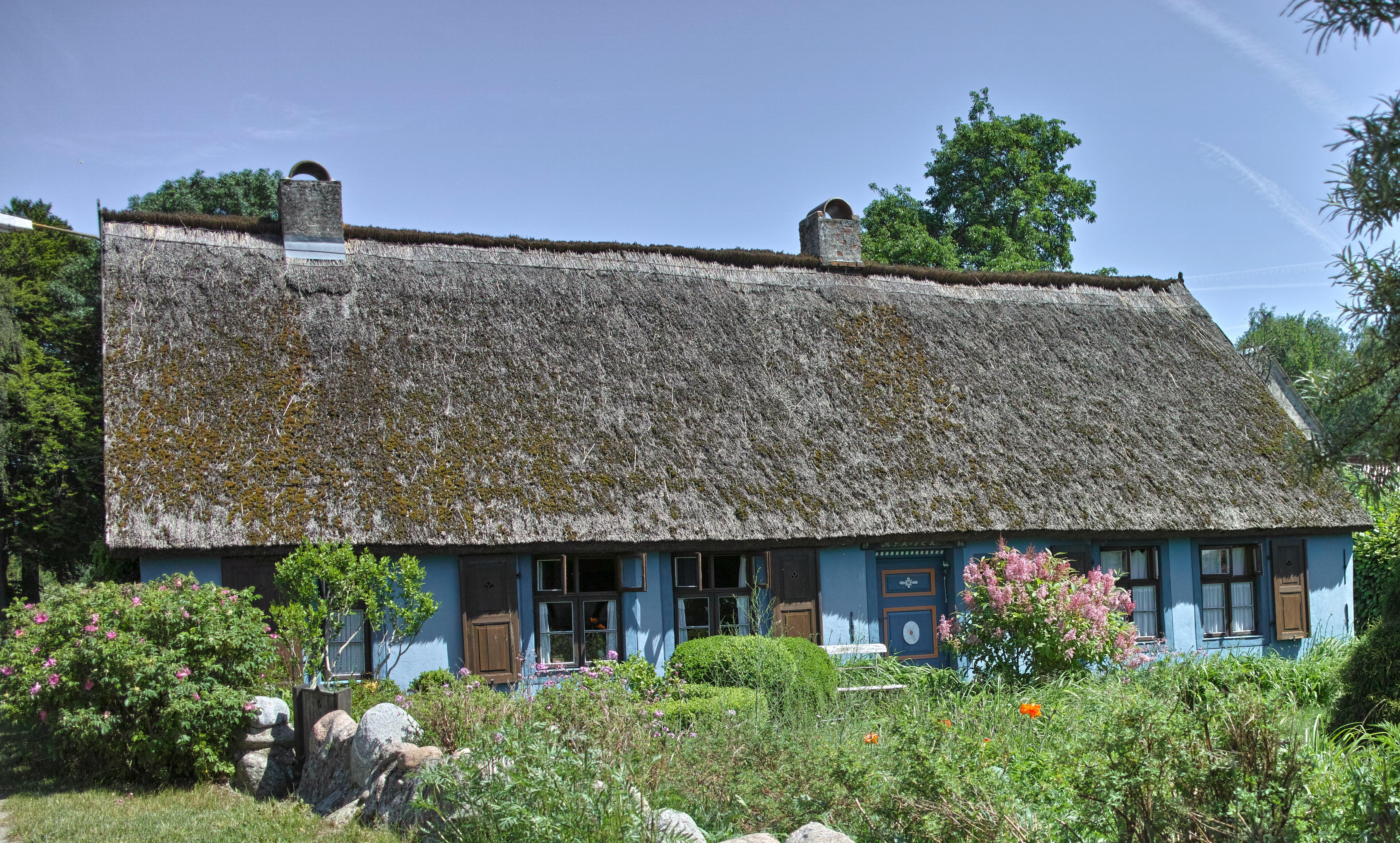 Blaues Haus im Lieper Winkel Naturpark Insel Usedom